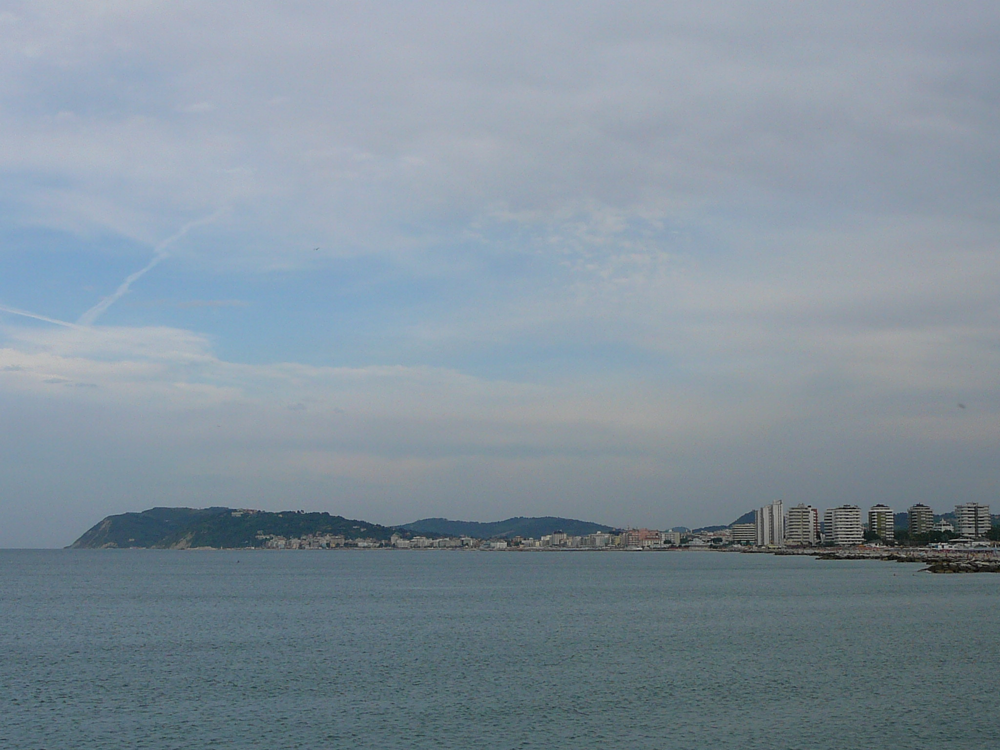 cattolica dal mare